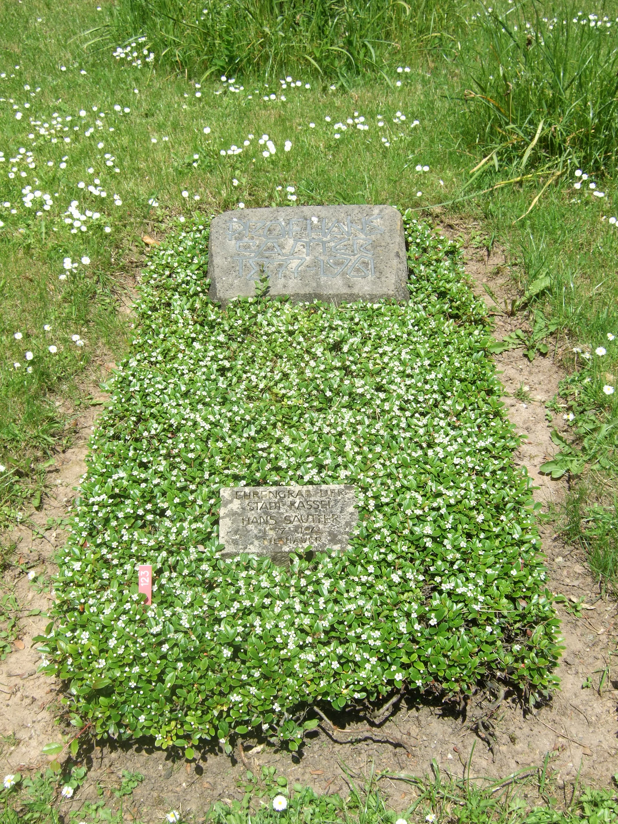 Grab von Hans Sautter auf dem Friedhof Harleshausen.